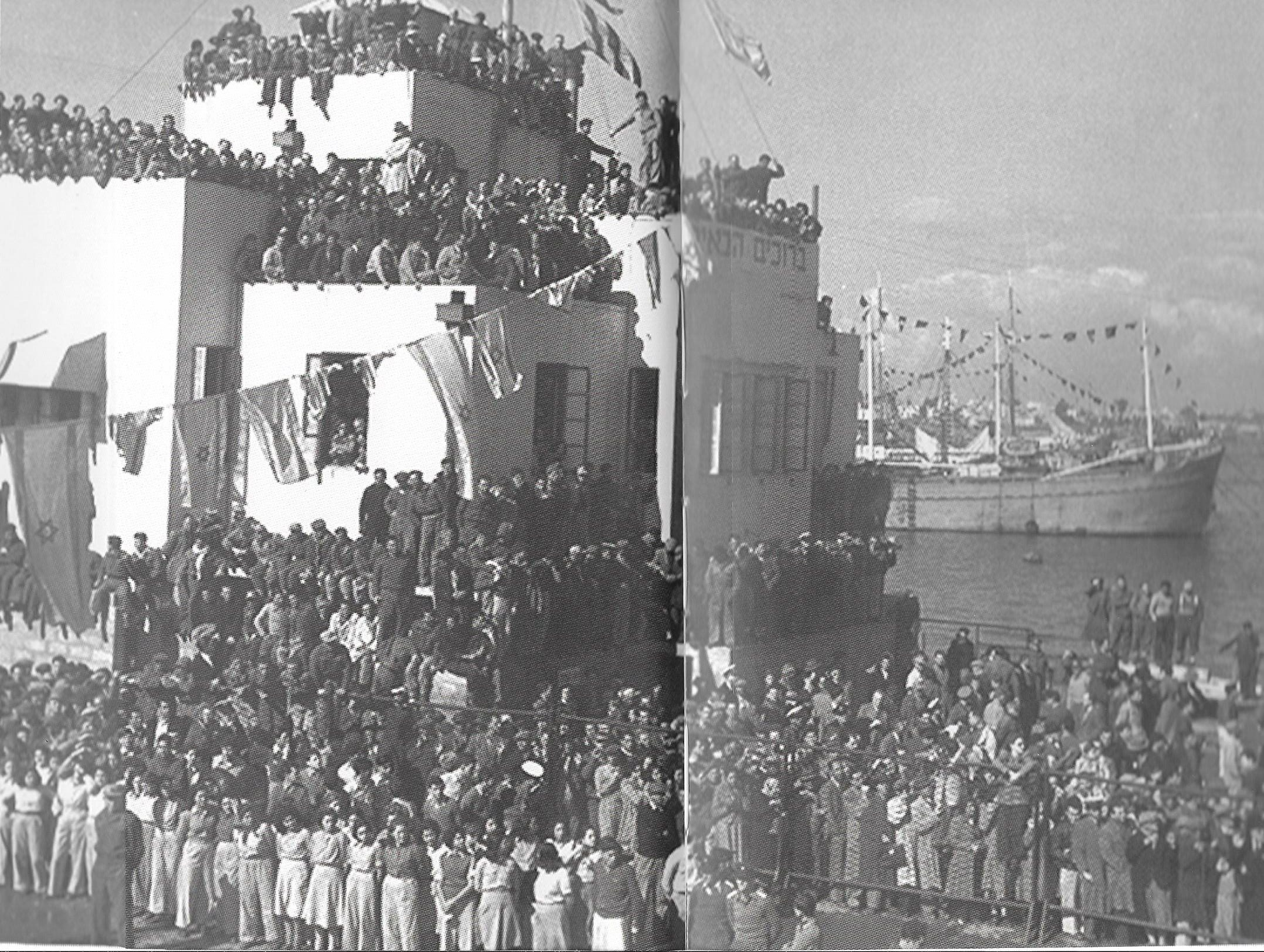 קבלת העולים ממחנות המעצר בקפריסין